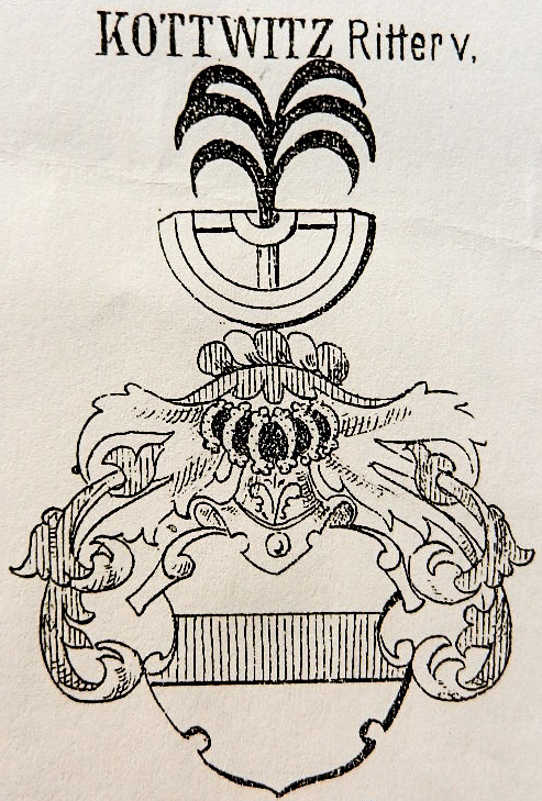 Kottwitz Wappen , Kaspar Ritter von Kottwitz 1534. Siebmacher Böhmischer Adel Tafel 135, S. 284